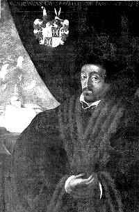 Wolfgang von Salm, Bischof von Passau